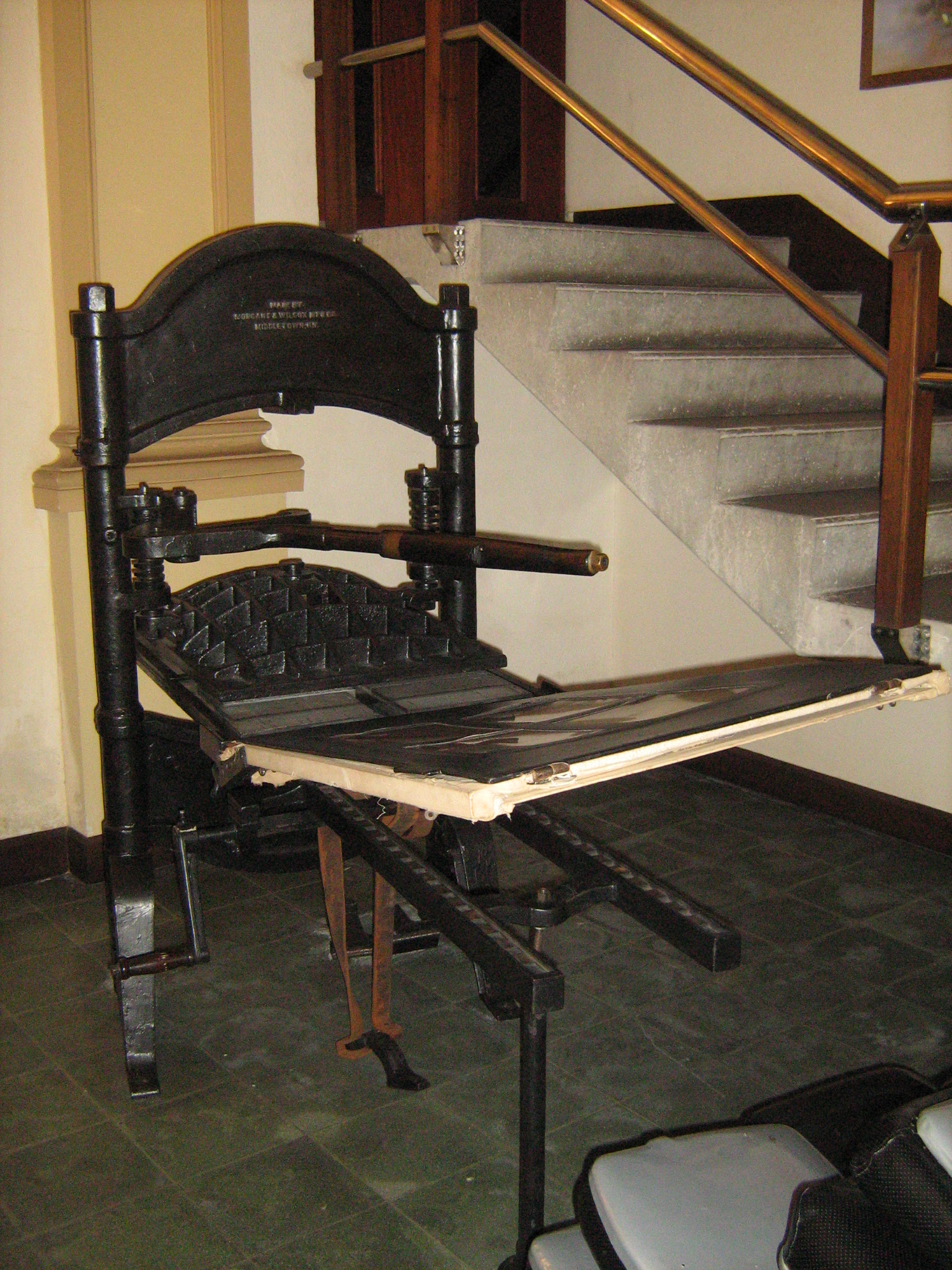 prensa Washington donde se imprimió el primer periódico El Espectador hace 117 años, Museo Universitario, Colección de Historia en el Edificio San Ignacio. Medellín, Colombia